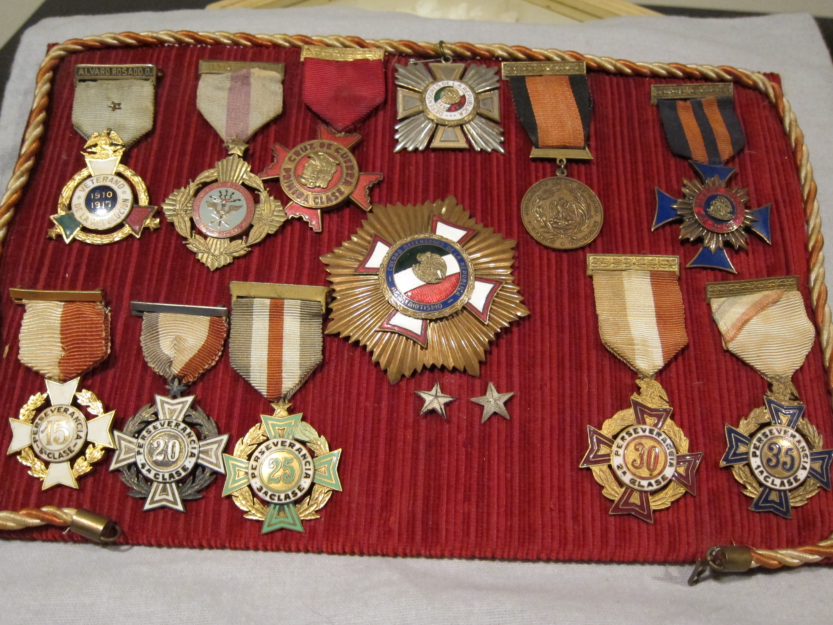 Medallas militares recibidas por el General Álvaro Rosado Osorio